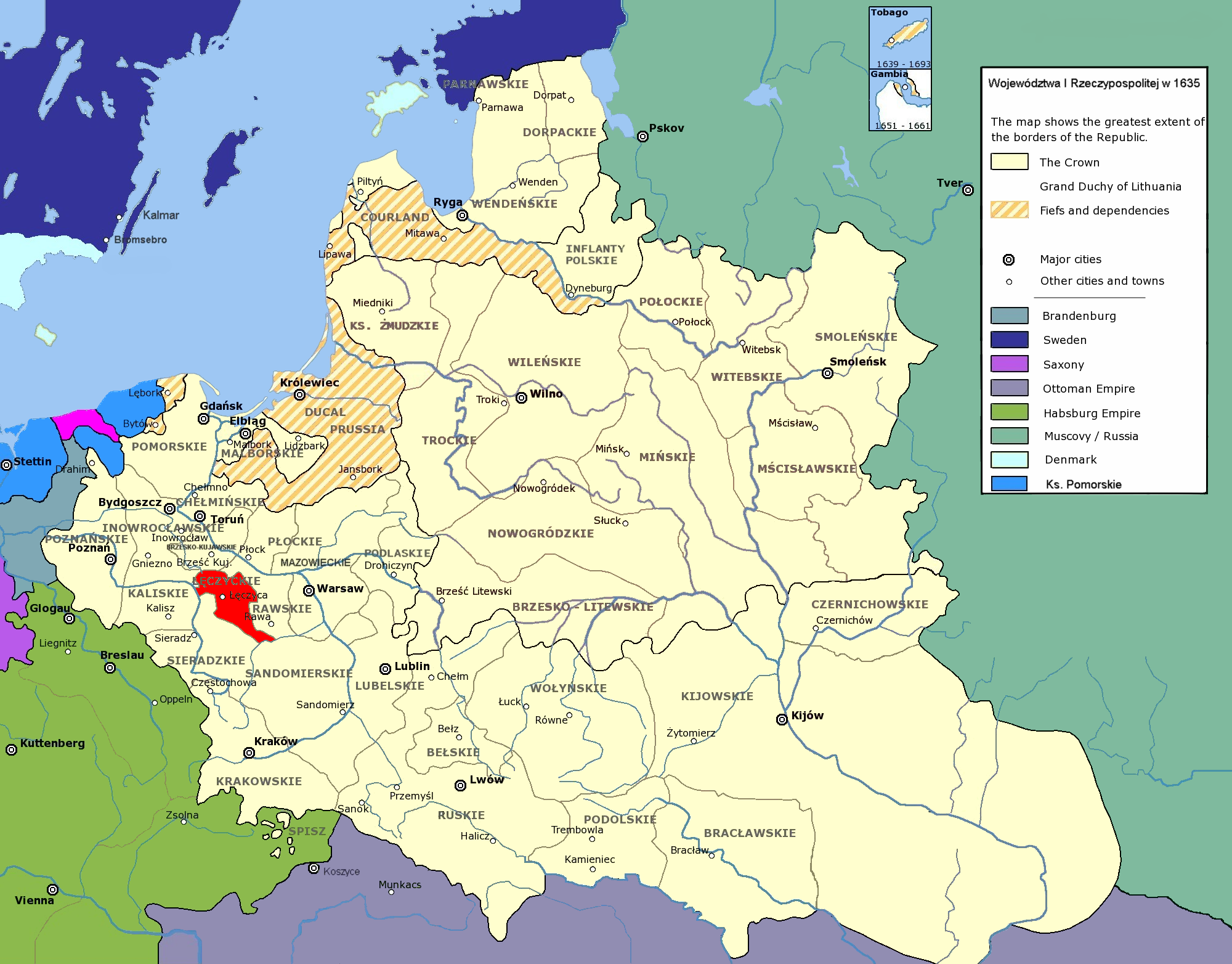 Rzeczpospolita Obojga Narodów w 1635 r.; województwo łęczyckie Polish-Lithuanian Commonwealth in 1635; Łęczyca Voivodeship